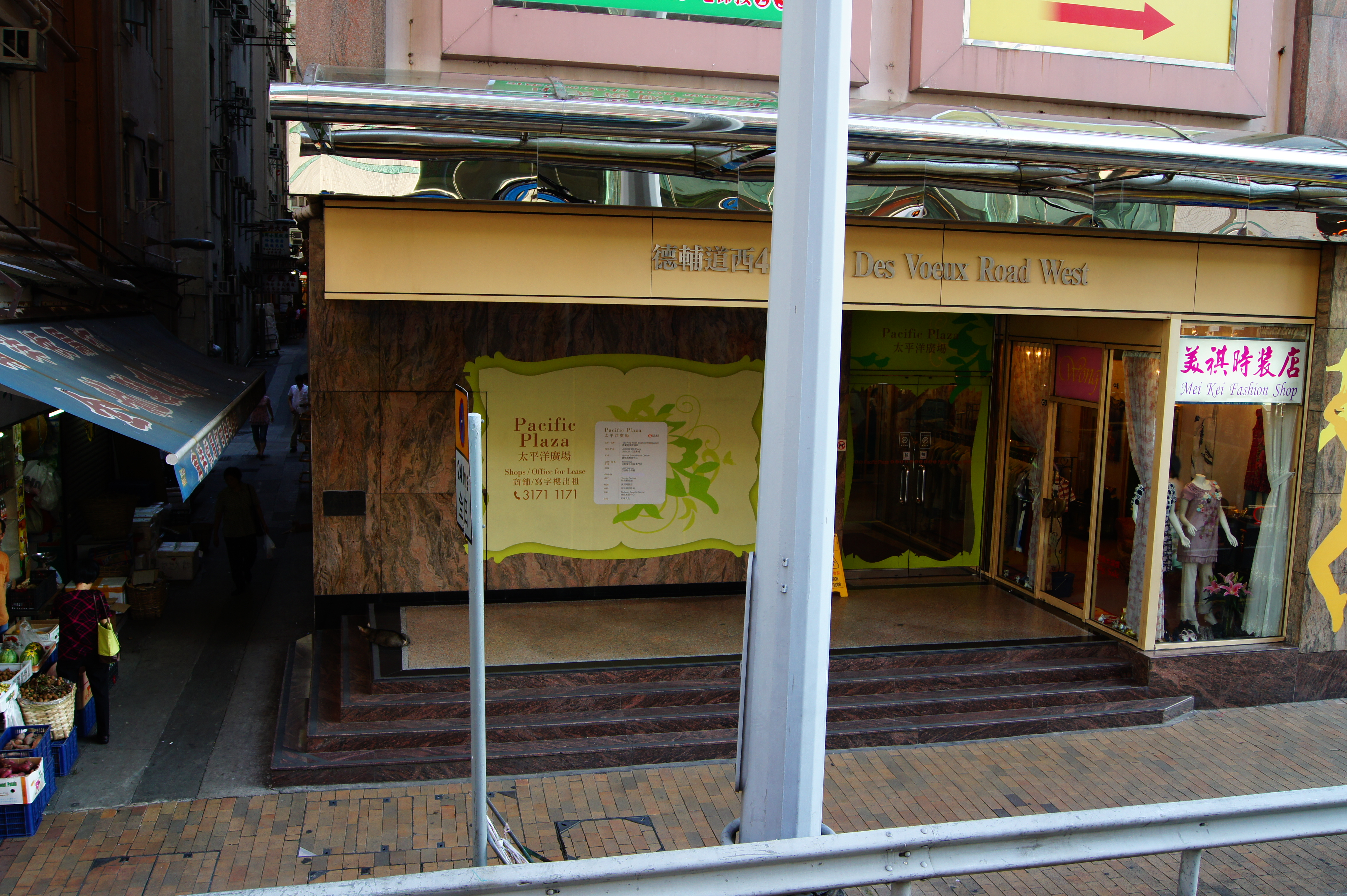 中文（香港）: 西港島綫屈地站預留出口（太平洋廣場）